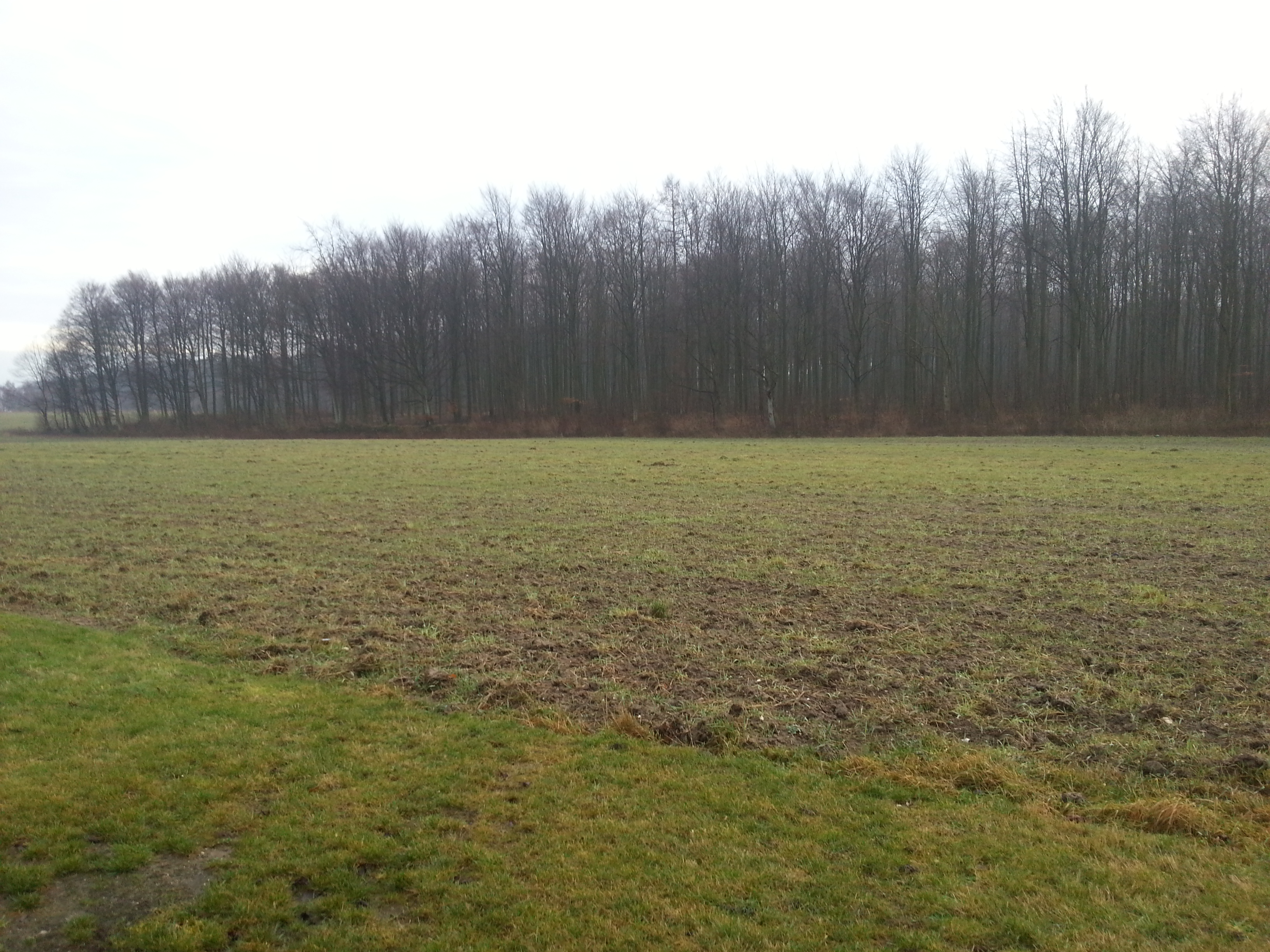 Udsigt mod Kelleris Hegn